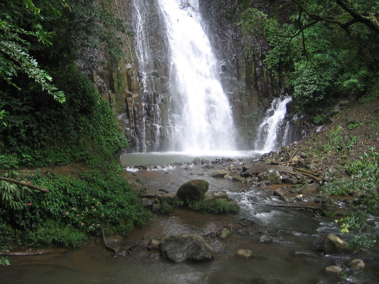 Catarata Los Chorros en el cantón de Grecia, provincia de Alajuela, Costa Rica.